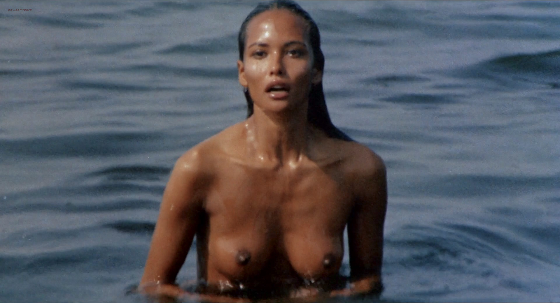 Laura Gemser en un fotograma del film Emanuelle y los últimos caníbales, dirigido por Joe D'Amato en 1977.